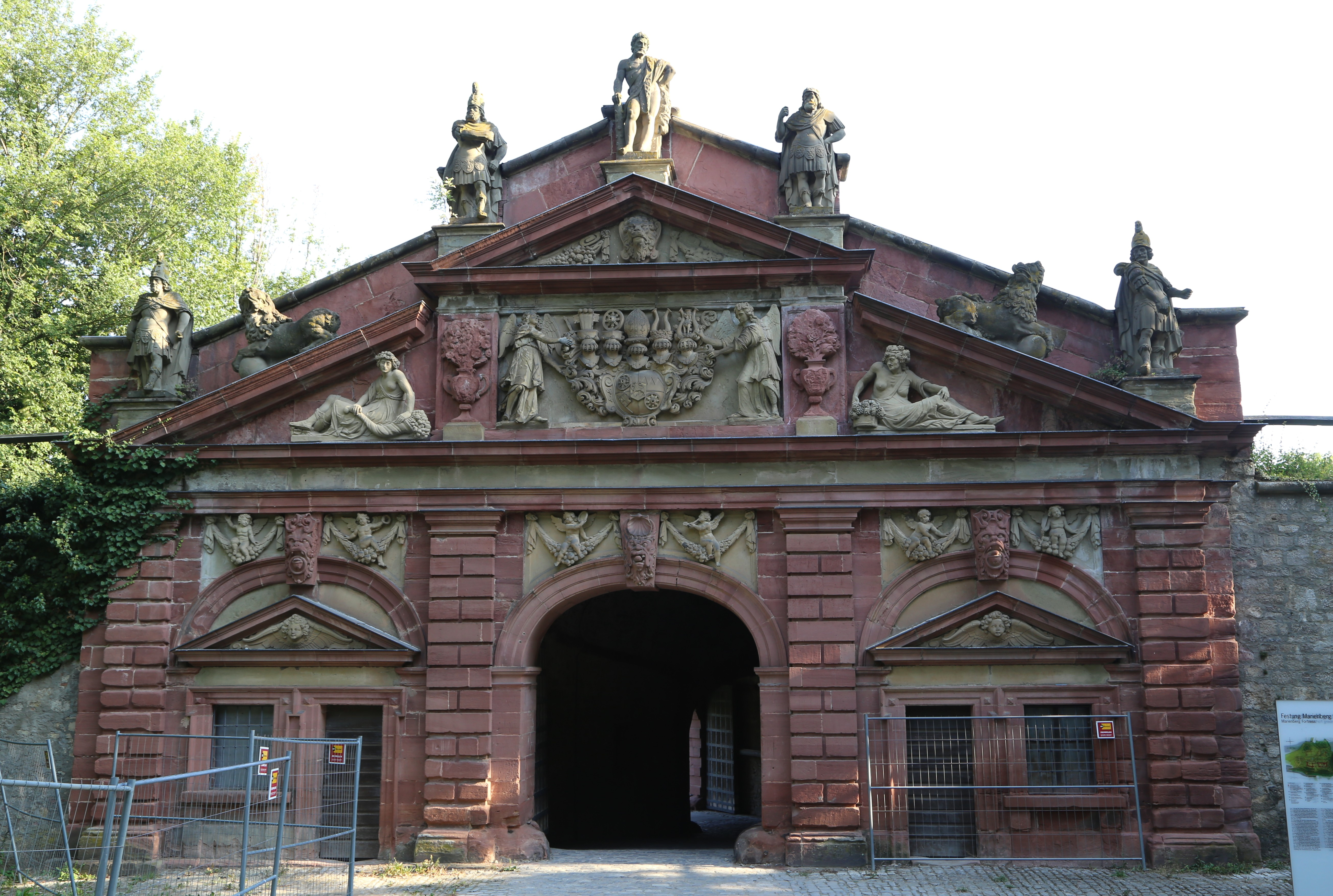 Festung Marienberg, Würzburg; Neutor, um 1650, von Johann Philipp Preiß, der figürliche Schmuck wohl von Zacharias Juncker d. J.